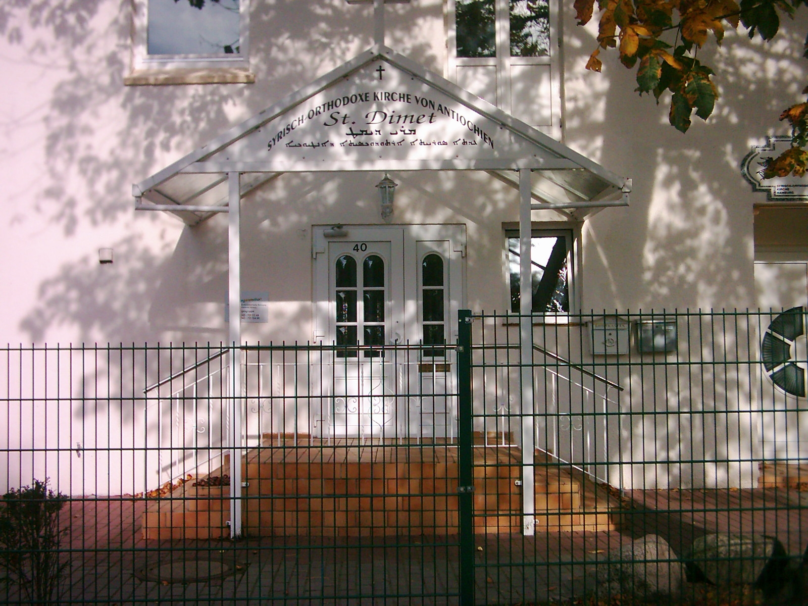 St. Dimet, Syrisch-Orthodoxe Kirche von Antiochien. Neugraben, Hamburg.